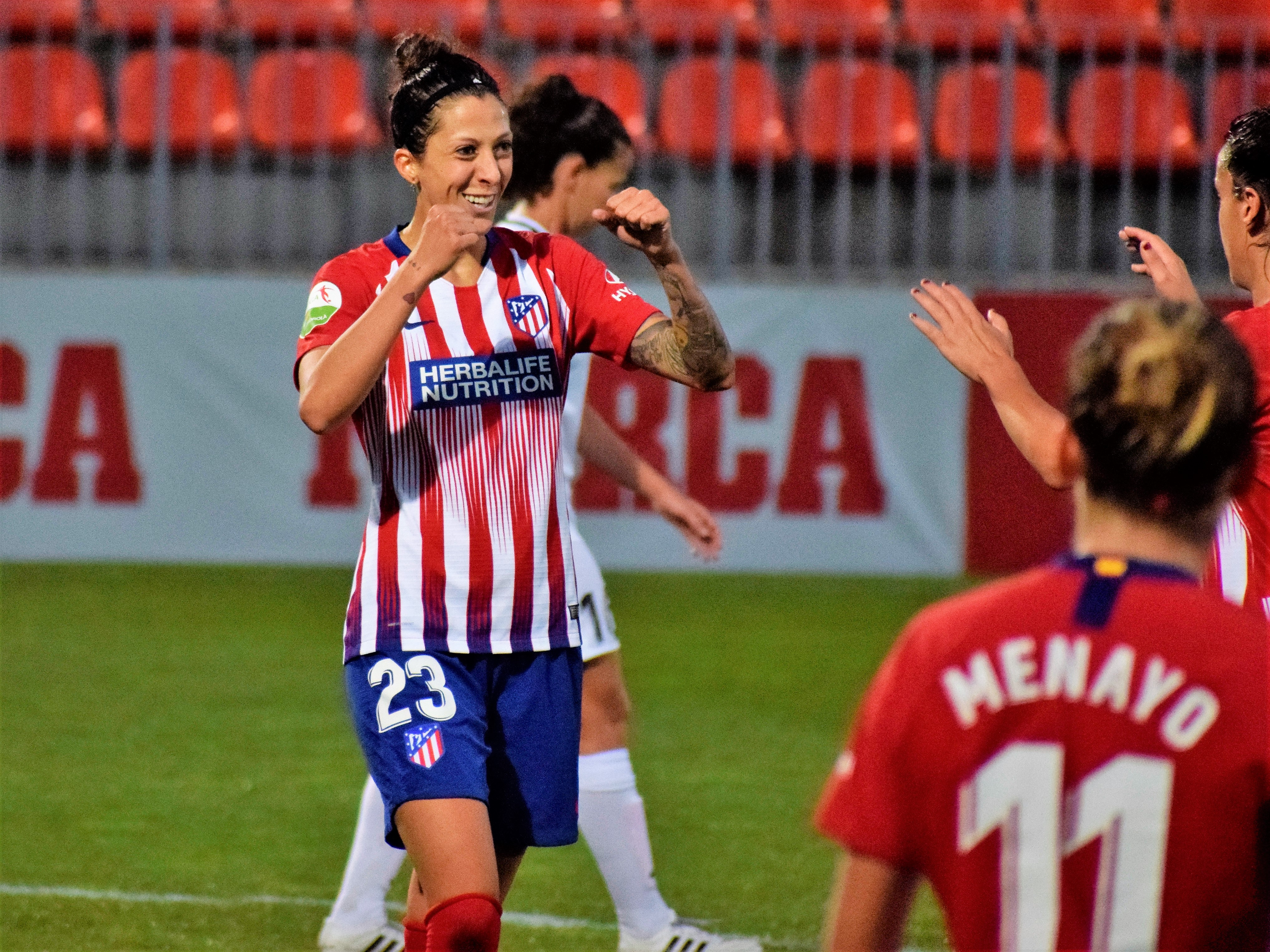 Jenni Hermoso jugando con el Atlético de Madrid